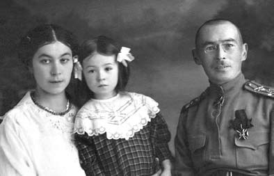 Helena, Tamara i Hassan Konopaccy